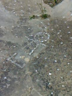 Tanit symbol in Selinunte